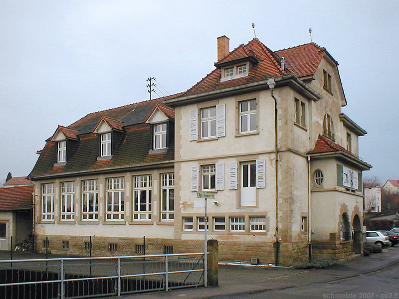 „Goldfabrik“ im Stil des Jugendstils in Neckarbischofsheim